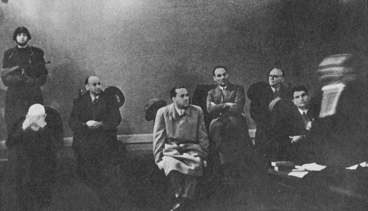 Galeazzo Ciano al processo di Verona, 1944, al centro col soprabito chiaro. Alla sua destra Pareschi e De Bono (con le mani sul viso). Alla sua sinistra nell'ordine Gottardi, Marinelli e Cianetti. [1]